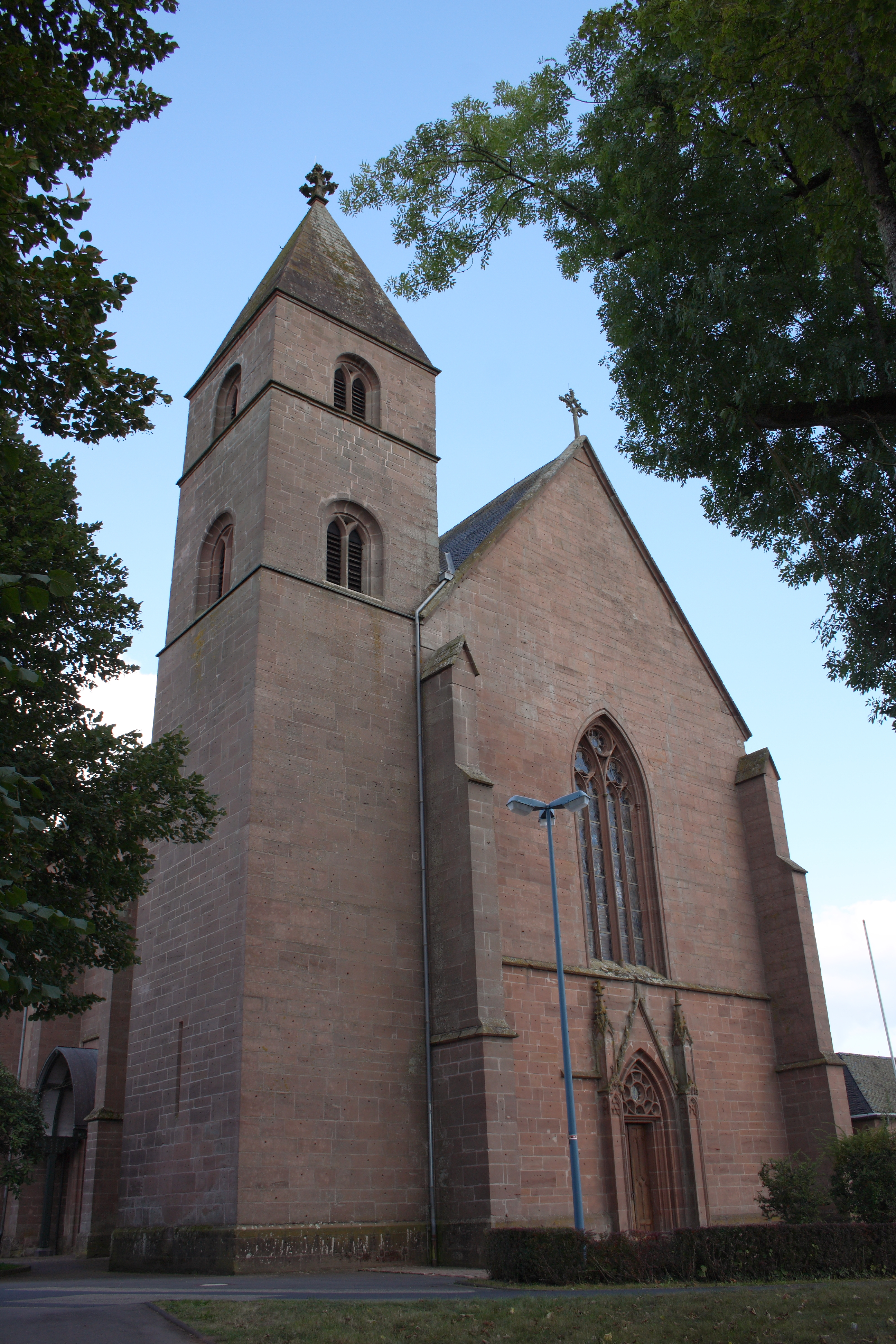 Katholische Pfarrkirche, ehemalige Stiftskirche Unsere Liebe Frau (Mariä Himmelfahrt) in Kyllburg im Eifelkreis Bitburg-Prüm (Rheinland-Pfalz), Westfassade mit Turm